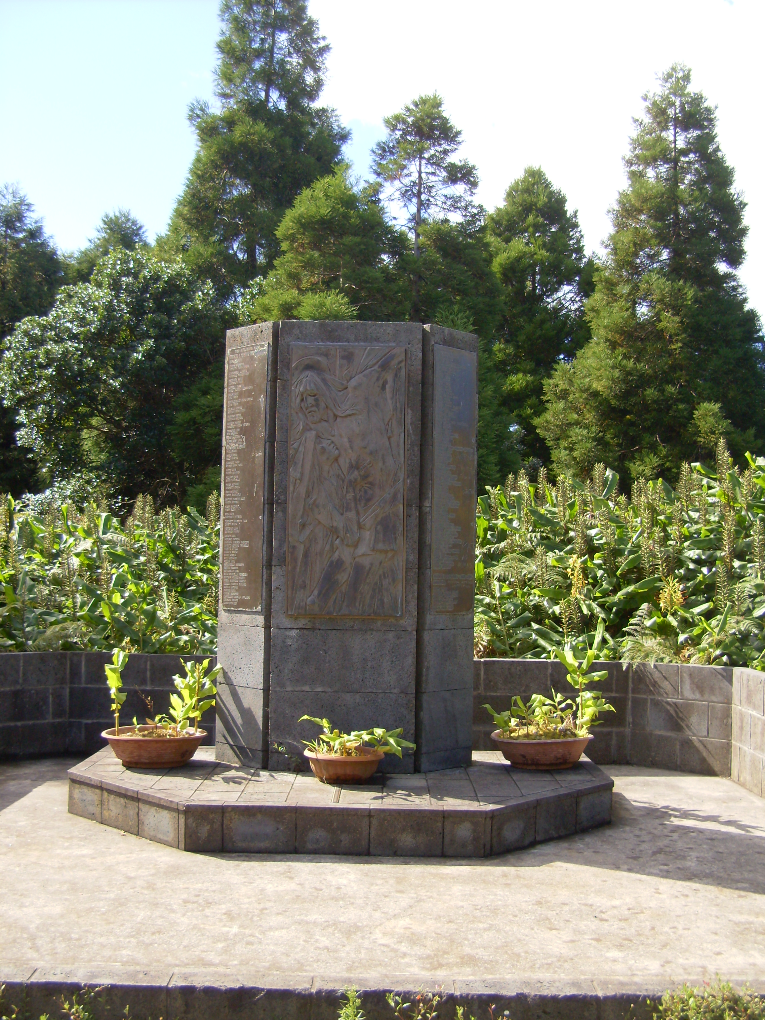 Pico Alto, concelho de Vila do Porto, ilha de Santa Maria, Açores: monumento aos mortos do vôo 1851.